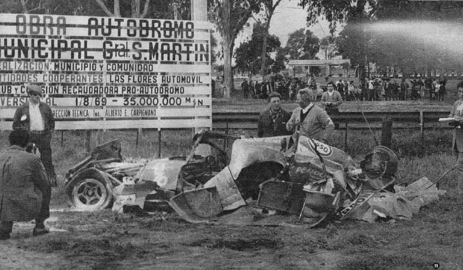 Accidente del piloto Andrea Vianini, el 4 de octubre de 1970 en la categoría Sport Prototipo Argentino.